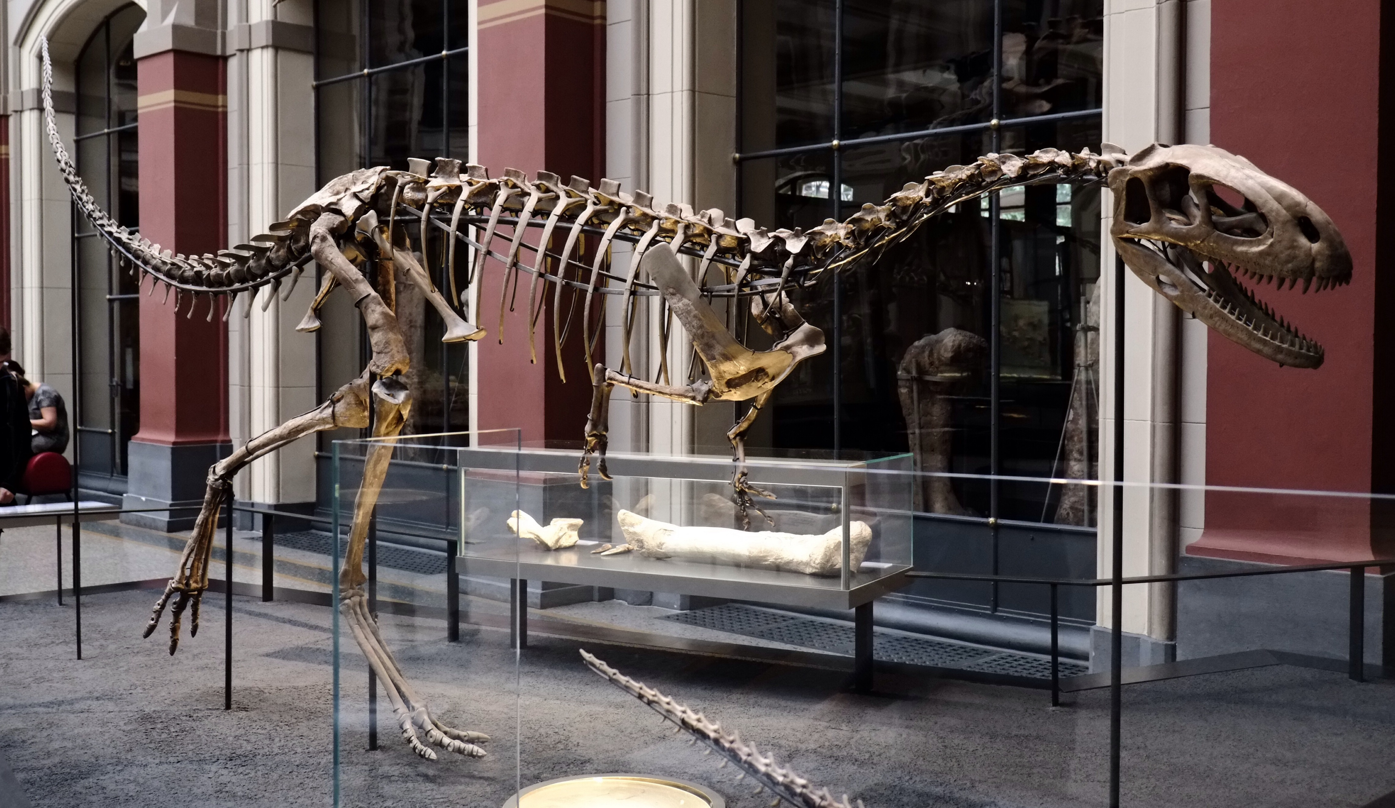 Berlin Museum für Naturkunde